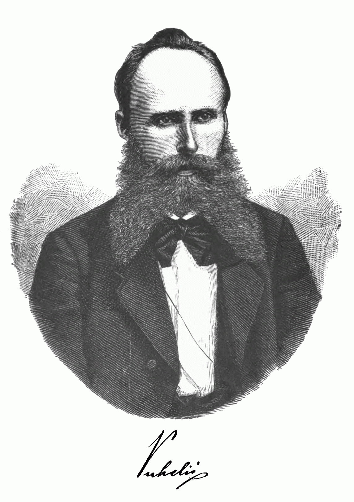 Lavoslav Vukelić (1840–1879), Croatian poet